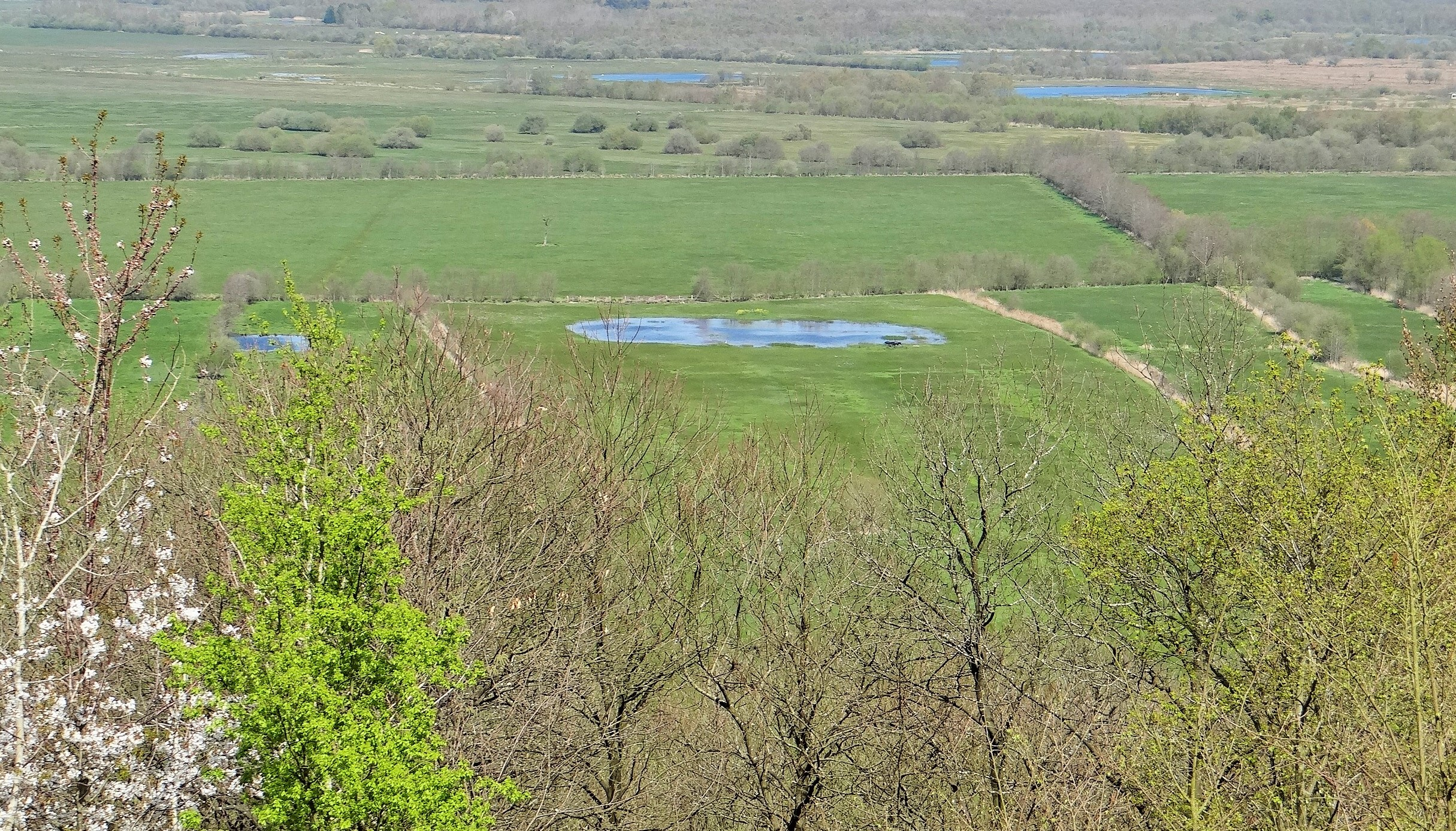 Réserve naturelle nationale du marais Vernier, vue d'ensemble